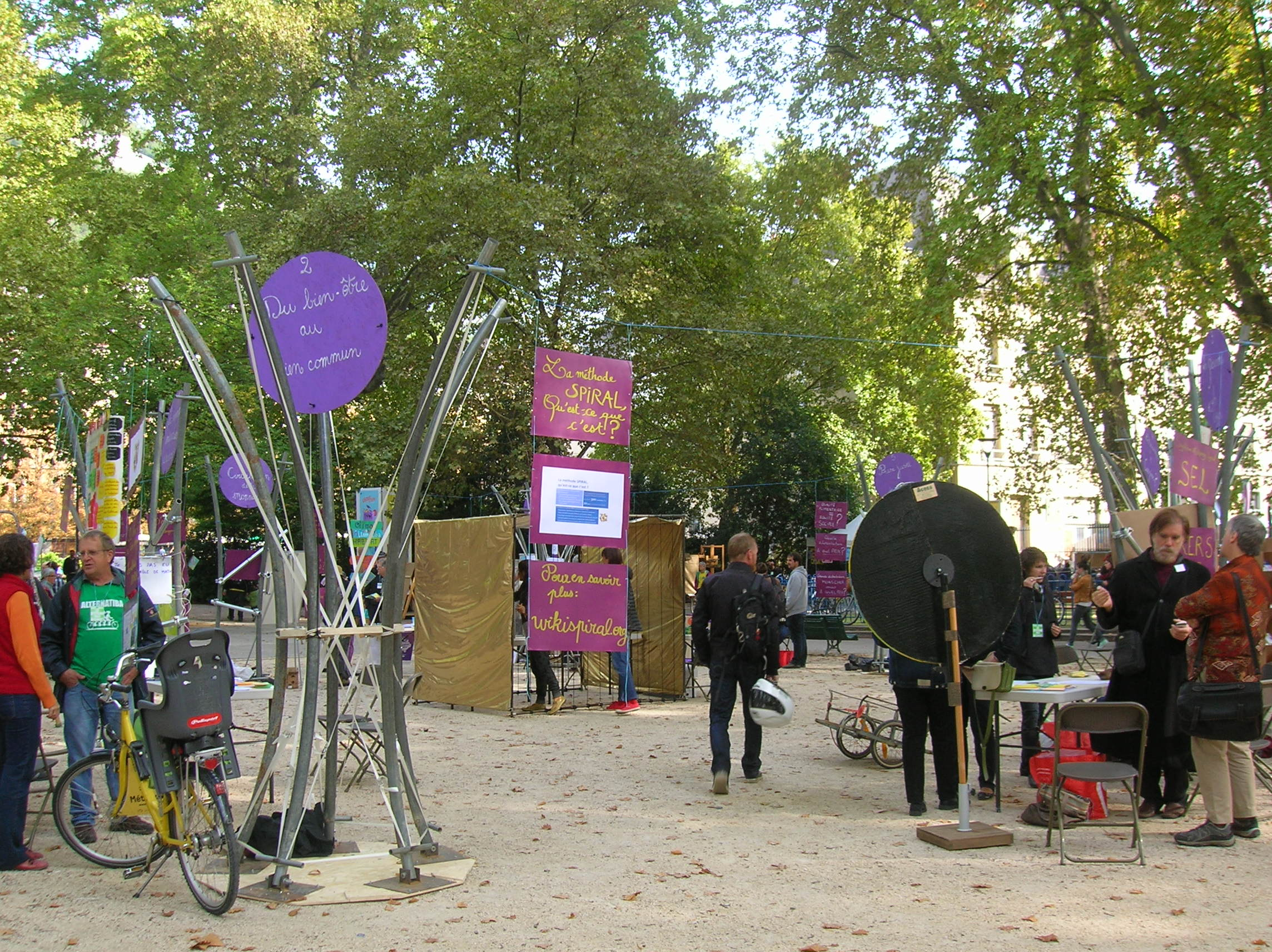 Alternatiba Grenoble 2015, Jardin de ville, Grenoble.